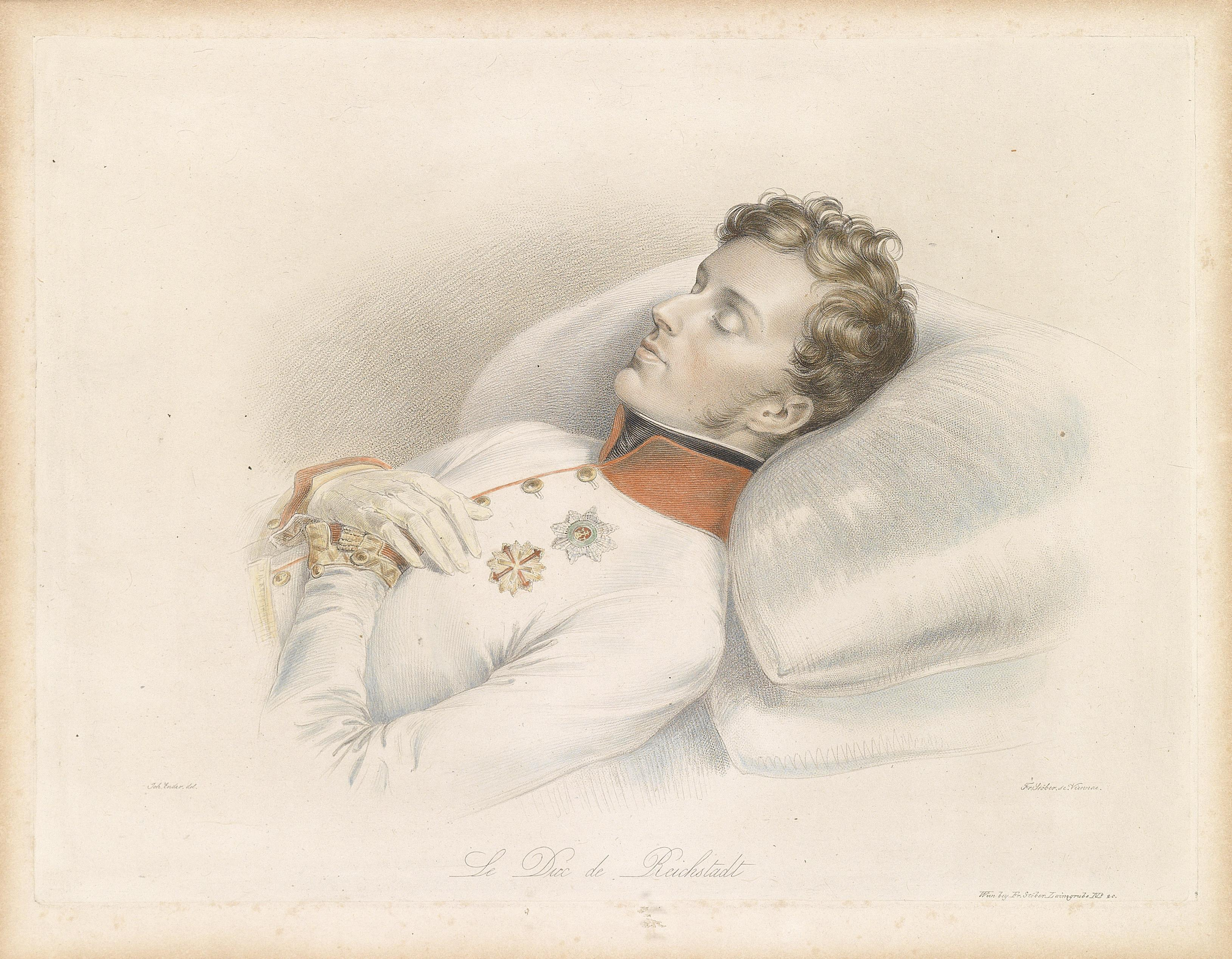 Der Herzog von Reichstadt (Napoleon II, † 1832) auf dem Totenbettlabel QS:Lde,"Der Herzog von Reichstadt (Napoleon II, † 1832) auf dem Totenbett"